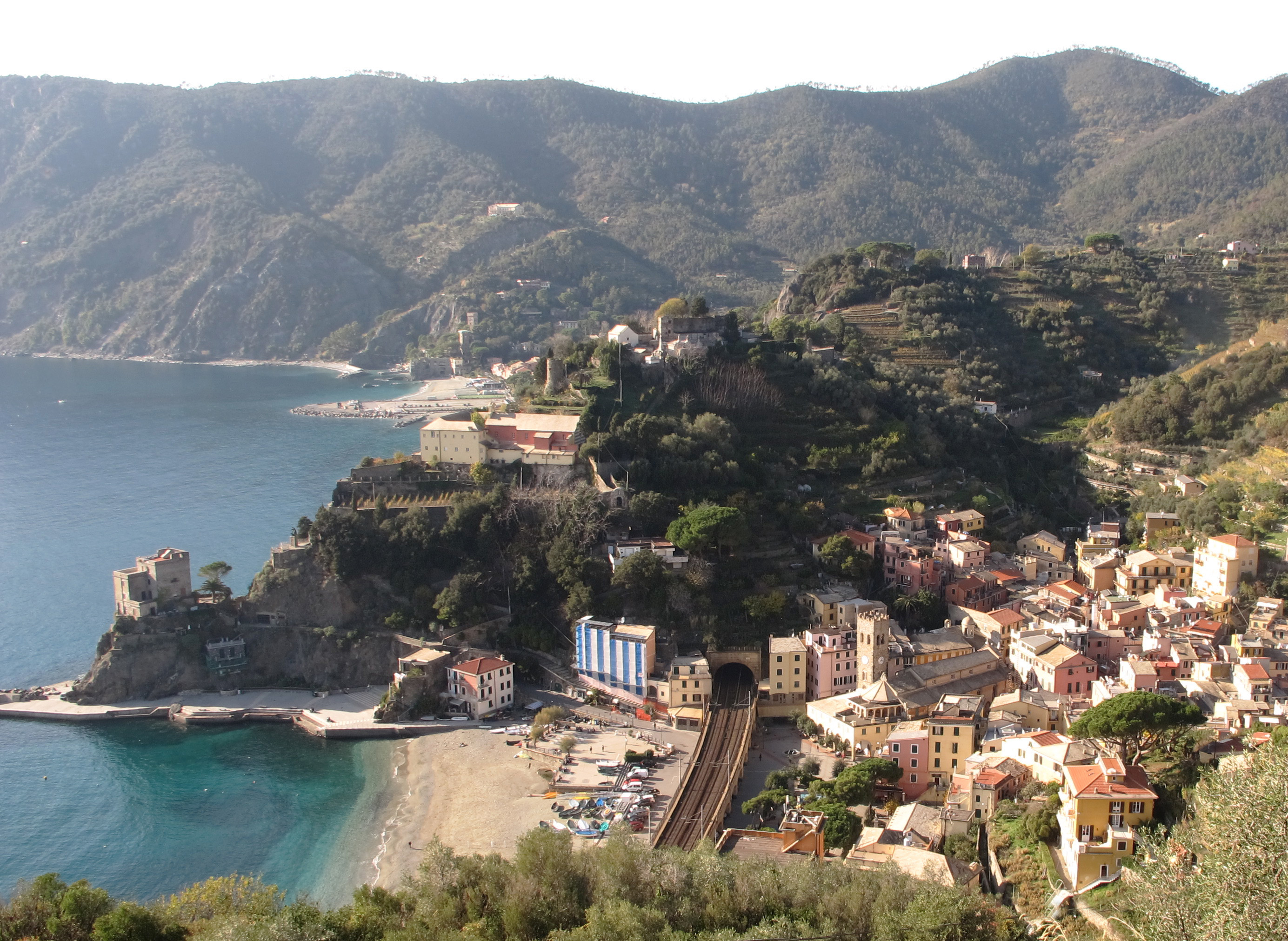 Monterosso al Mare, Cinque Terre, Italie.